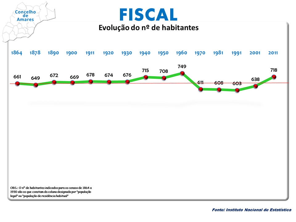 Censo 2011